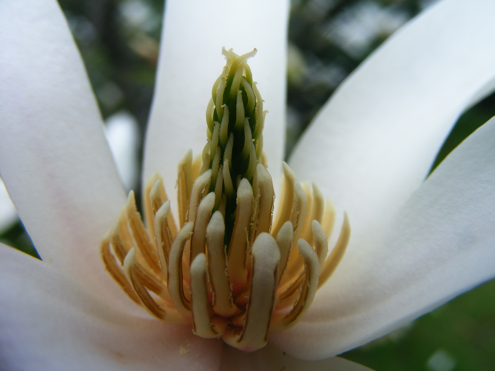 Wnętrze tudzież apokarpijne słupkowie magnolii gwiaździstej. Zdjęcie makro w Zagnańsku.